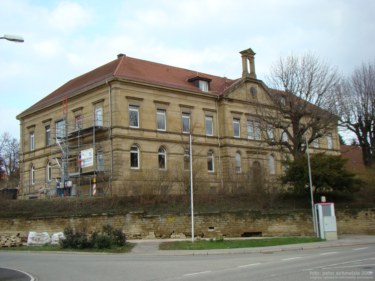 Historisches Gebäude Brettener Straße 64 in Eppingen